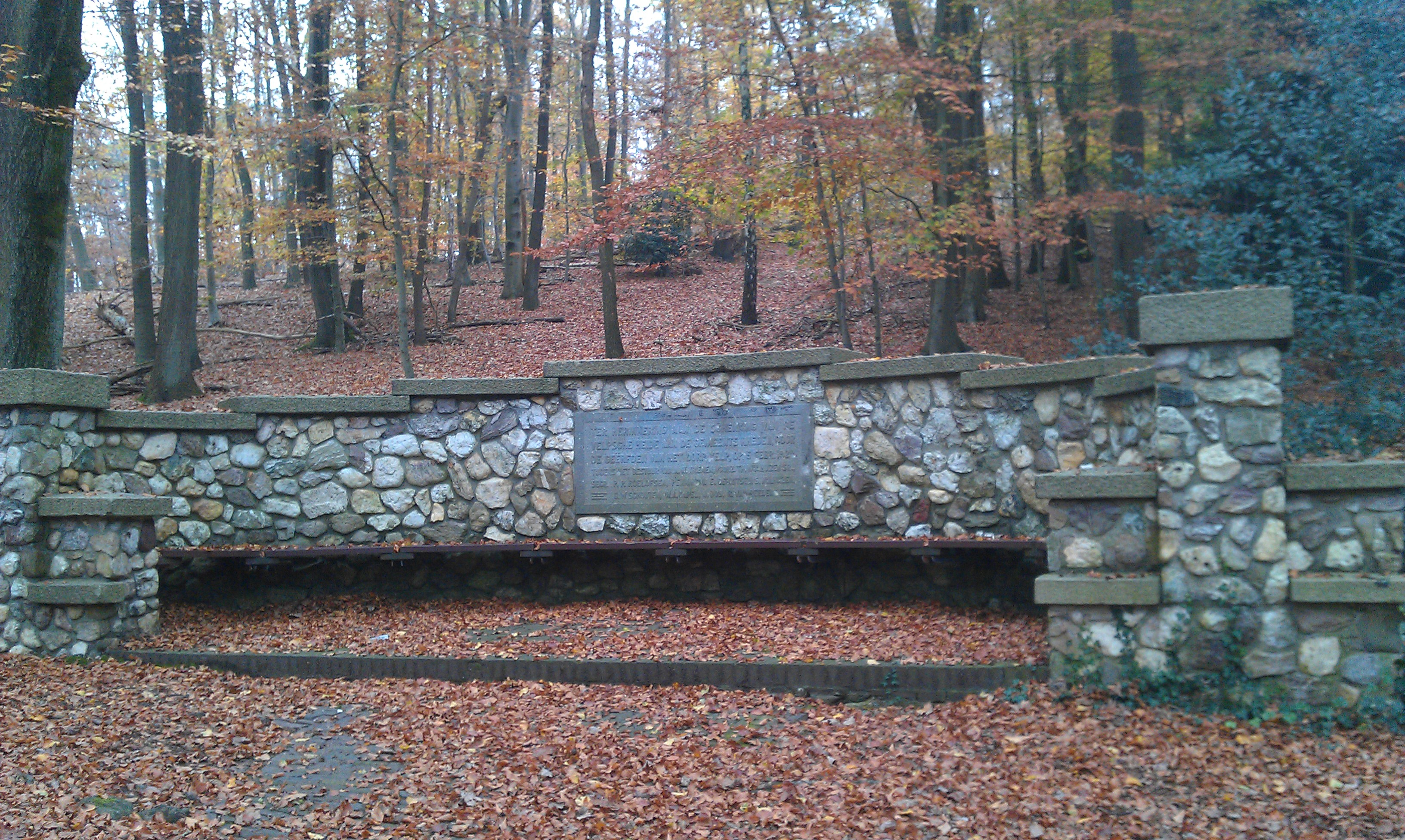 Bank ter herinnering aan de overdracht van Geërfden-grond van de bewoners van het dorp Velp (Gld) aan de gemeente Rheden.